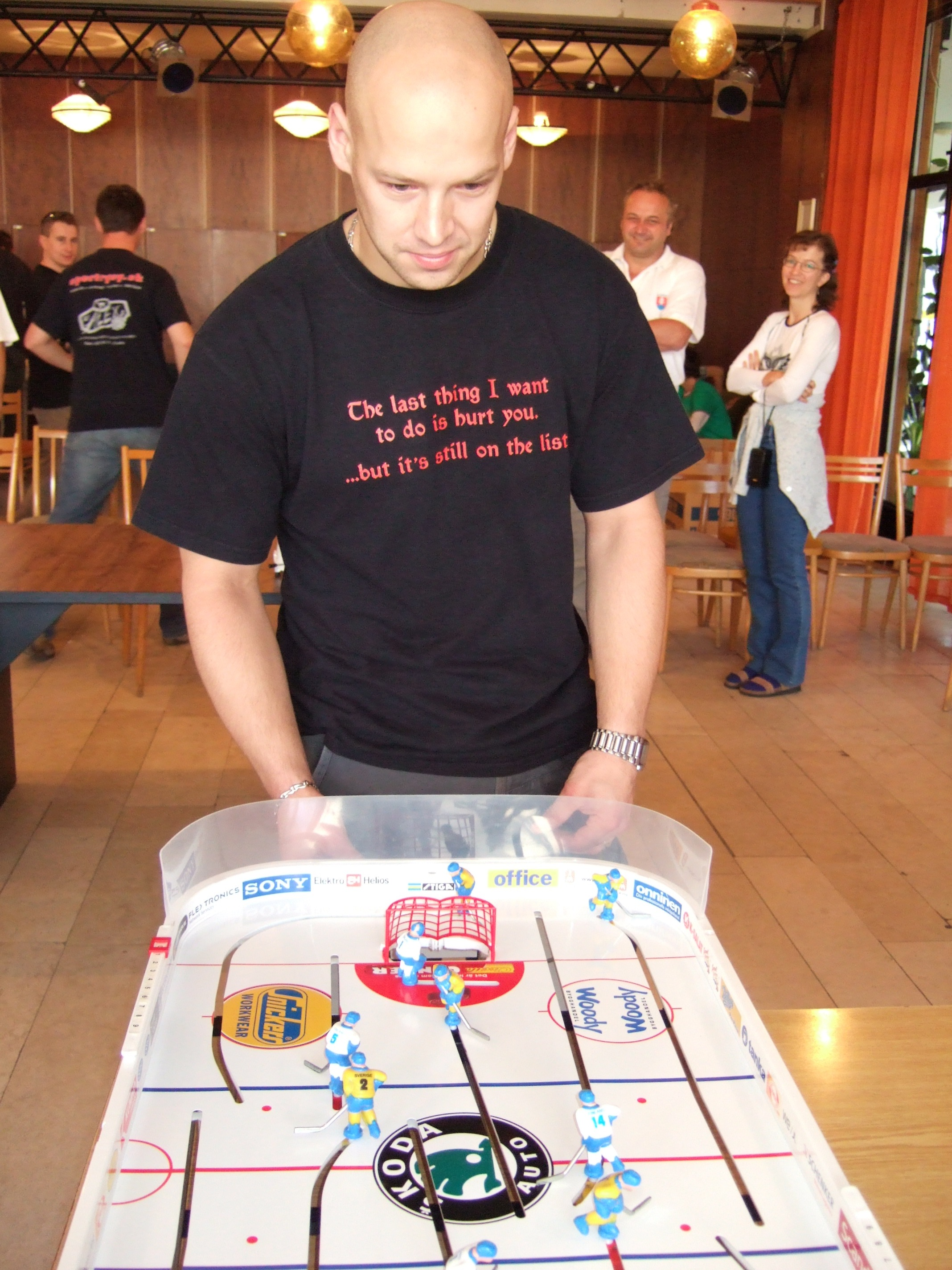 Jiří Bicek, a Slovak ice hockey forward